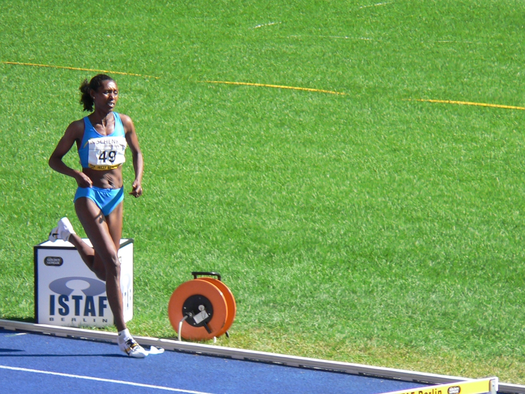 Berhane Adere, Gewinnern 5000m Frauen ISTAF 2005 in Berlin